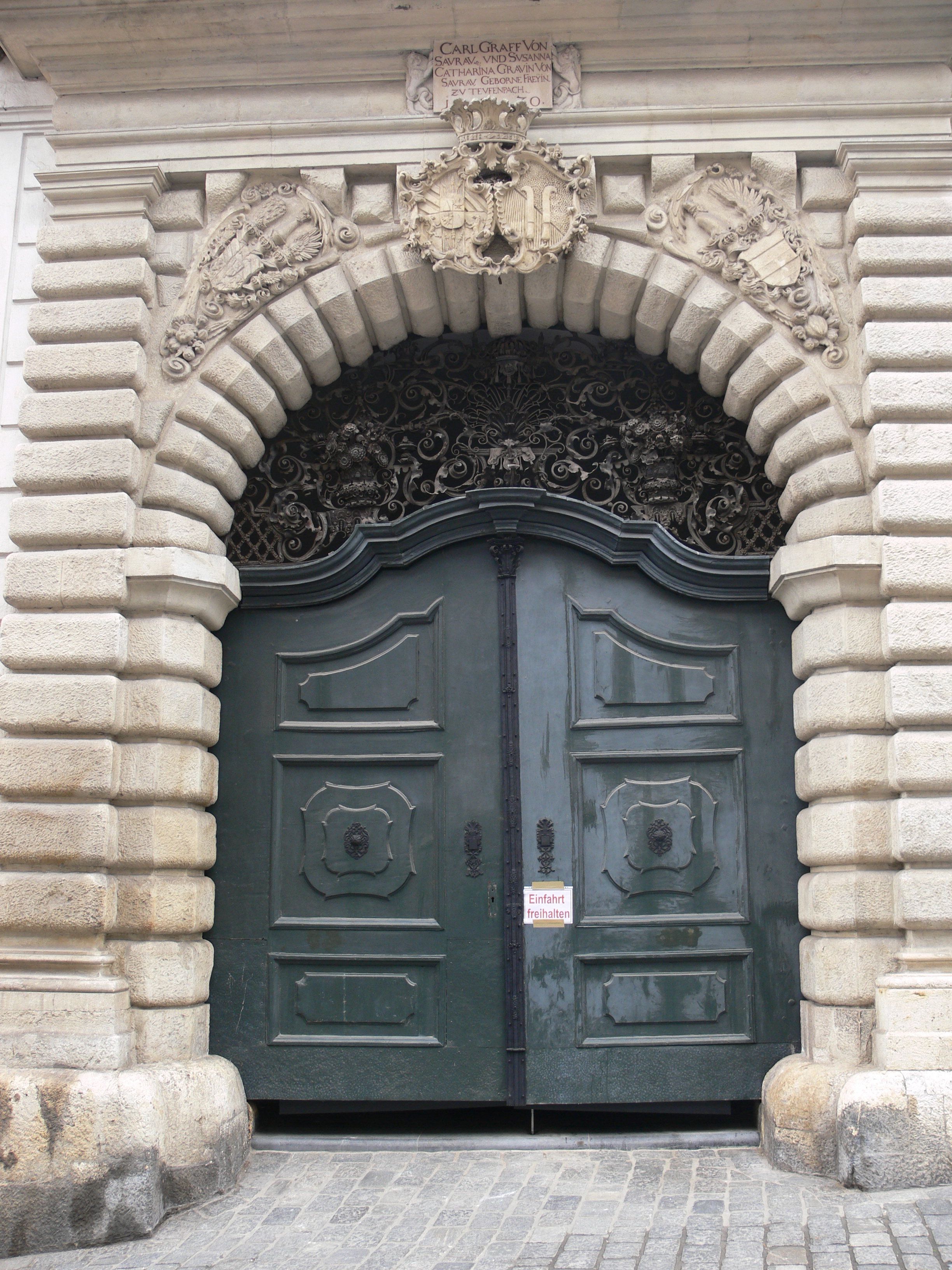 Graz, Palais Saurau, Portal